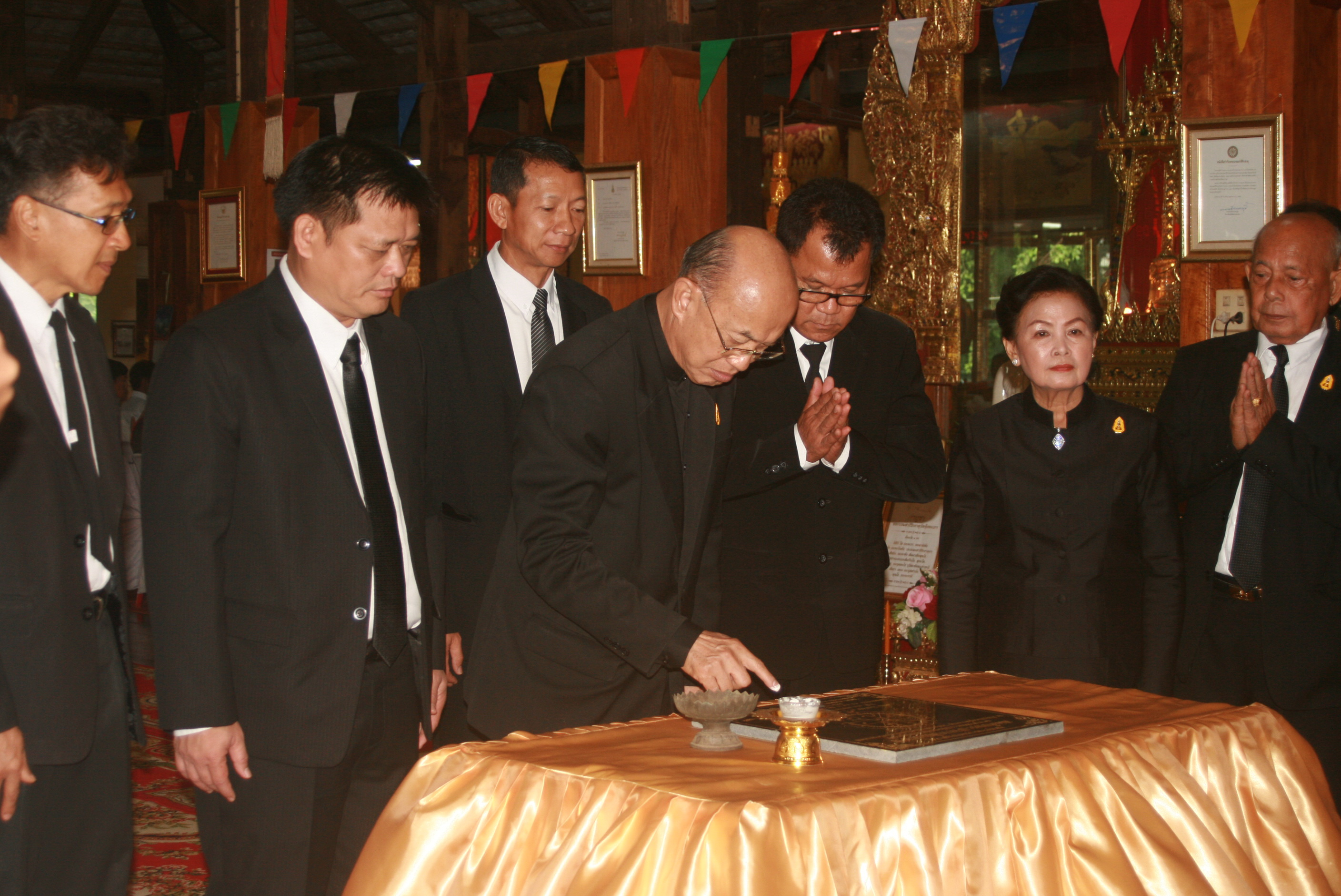 ฯพณฯ ศาสตราจารย์ นพ.เกษม วัฒนชัย องคมนตรี เป็นประธานในพิธีบวงสรวงวางศิลาฤกษ์พระบรมราชานุสาวรีย์คู่บารมีกู้แผ่นดิน ณ วัดคุ้งตะเภา วันที่ ๑๒ พ.ย. ๕๙